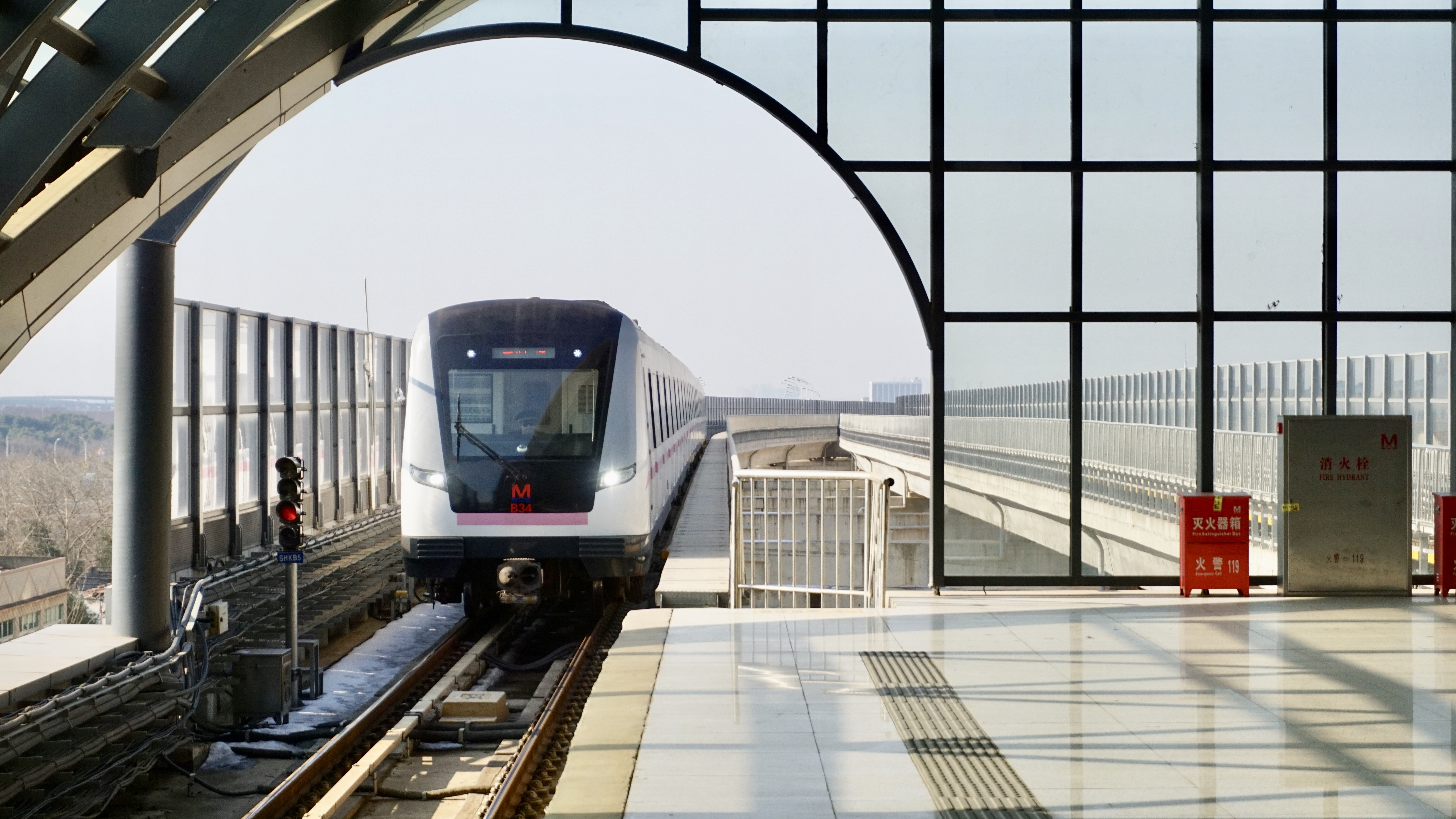 武汉轨道交通2号线列车